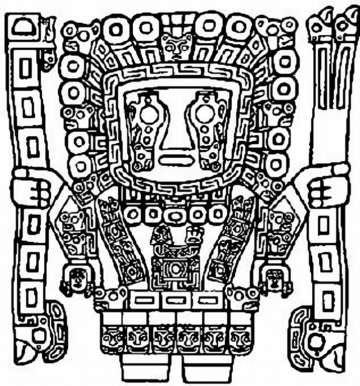 Wiracocha